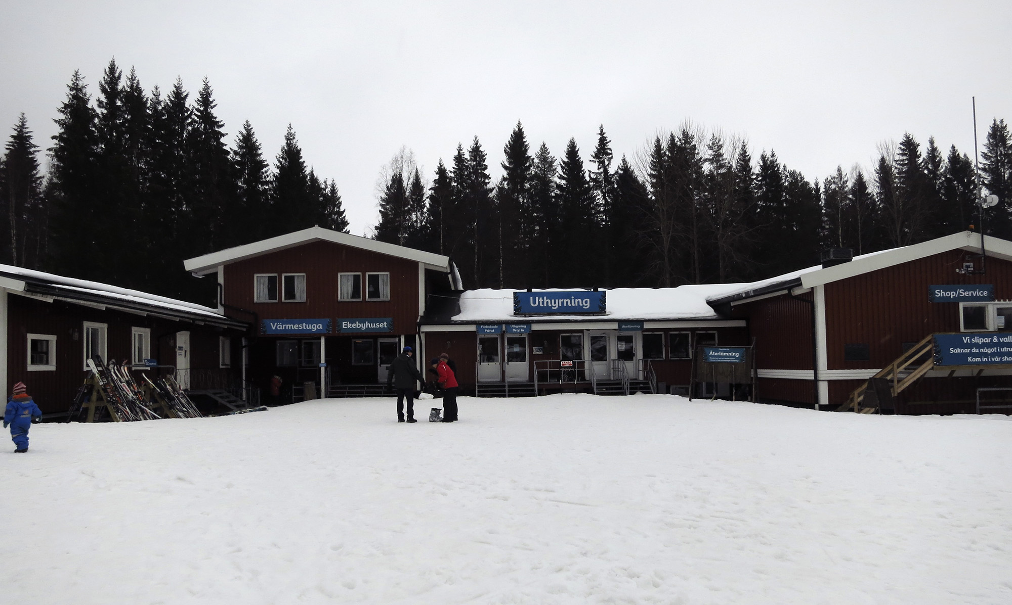 Sunne Ski Center i februari 2015.